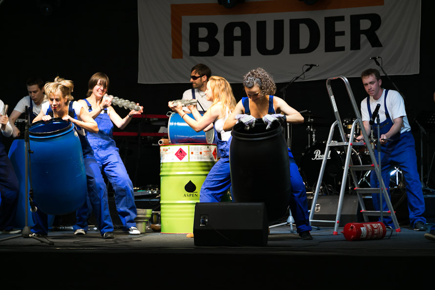 Trommelshow Themenpercussion